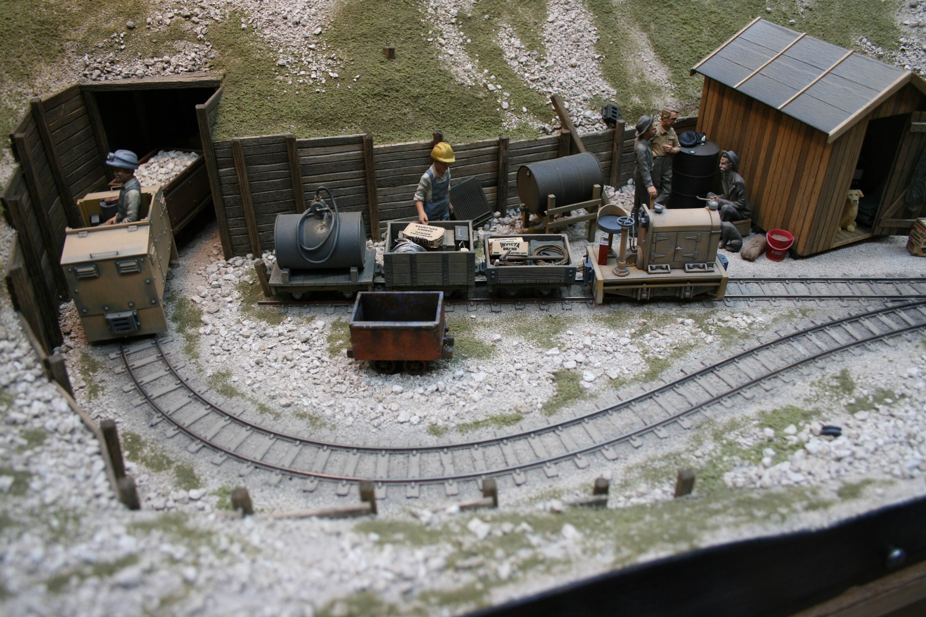 Train minier à l'échelle Gn15.